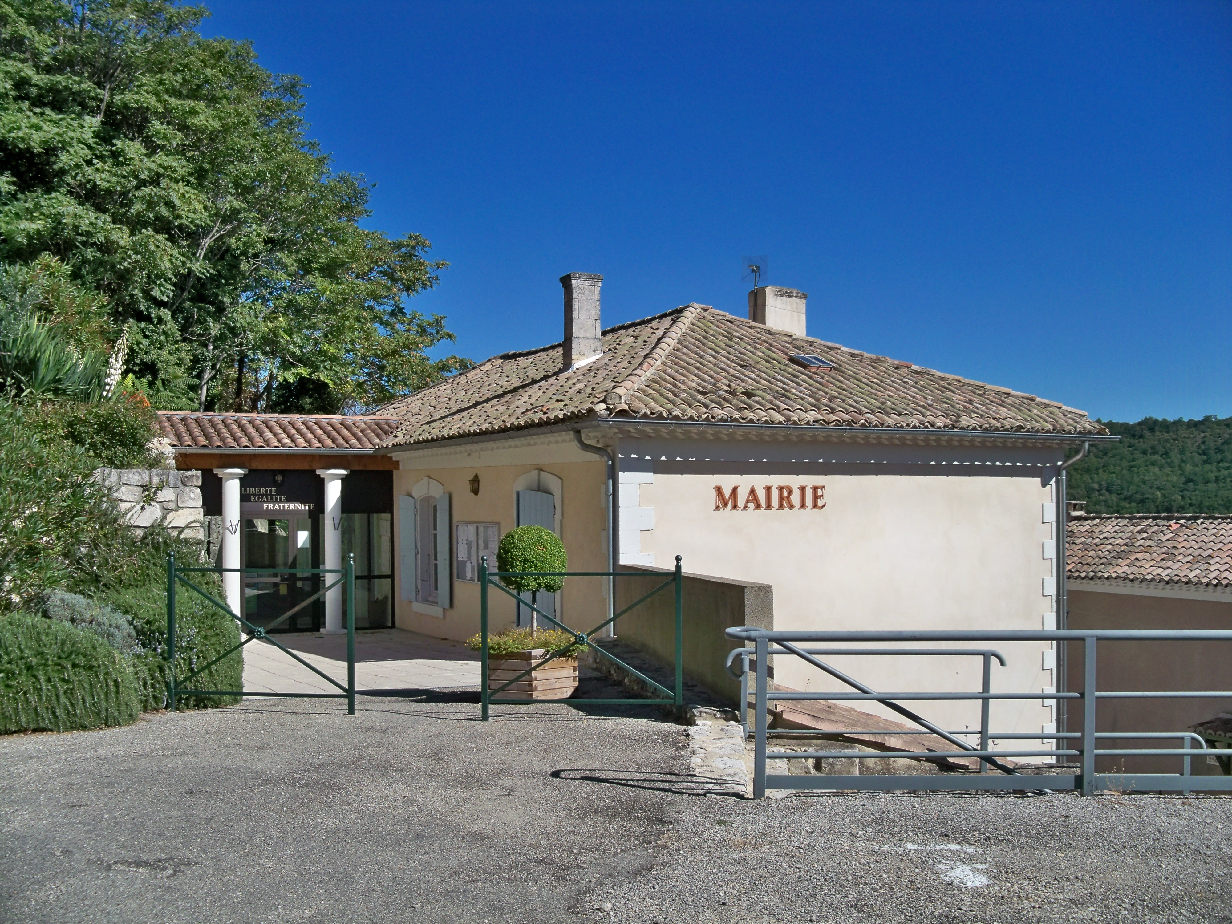 Mairie de Clansayes (26)